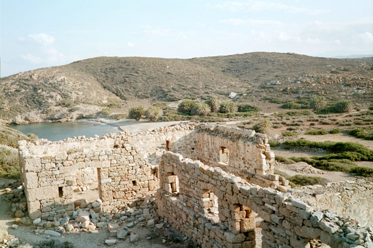 Itanos, Kreta Autor: -- Wolfi 04:46, 9. Nov 2004 (CET) Größe: 758 x 512